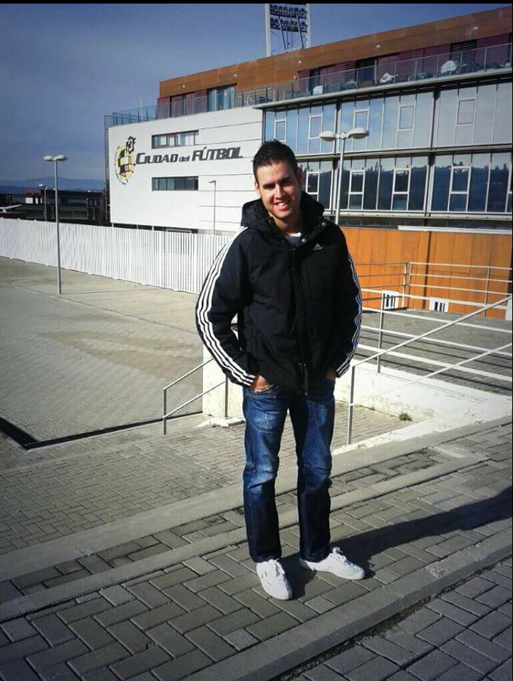 Presidente del Club Deportivo Villamuriel de fútbol